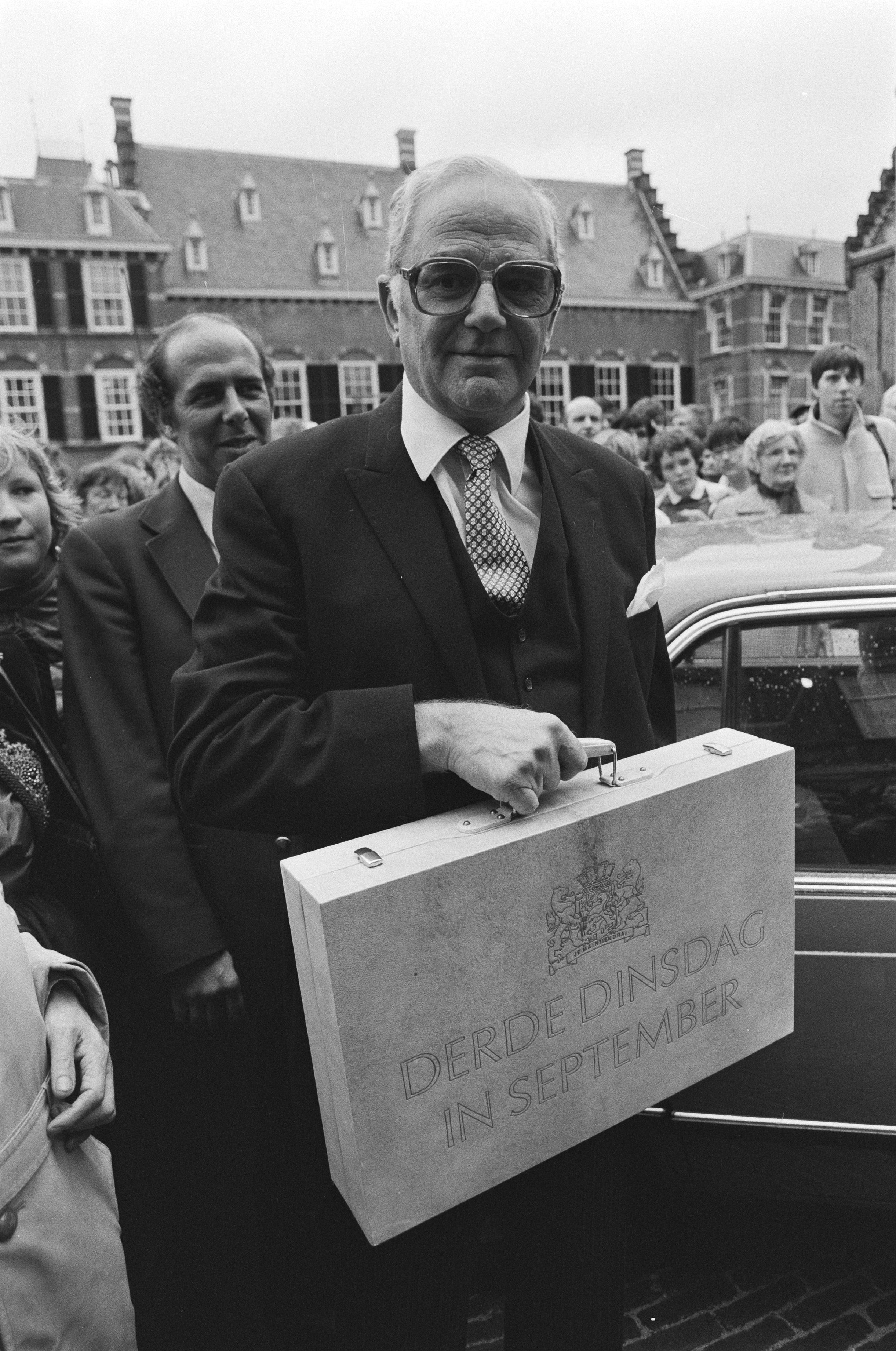 Collectie / Archief : Fotocollectie Anefo Reportage / Serie : Opening van de Staten-Generaal Beschrijving : Minister Van der Stee met het miljardenkoffertje op het Binnenhof Datum : 21 september 1982 Locatie : Den Haag, Zuid-Holland Trefwoorden : ministers, openingen, overheidsbegrotingen Persoonsnaam : Stee, Fons van der Fotograaf : Antonisse, Marcel / Anefo Auteursrechthebbende : Nationaal Archief Materiaalsoort : Negatief (zwart/wit) Nummer archiefinventaris : bekijk toegang 2.24.01.05 Bestanddeelnummer : 932-3361